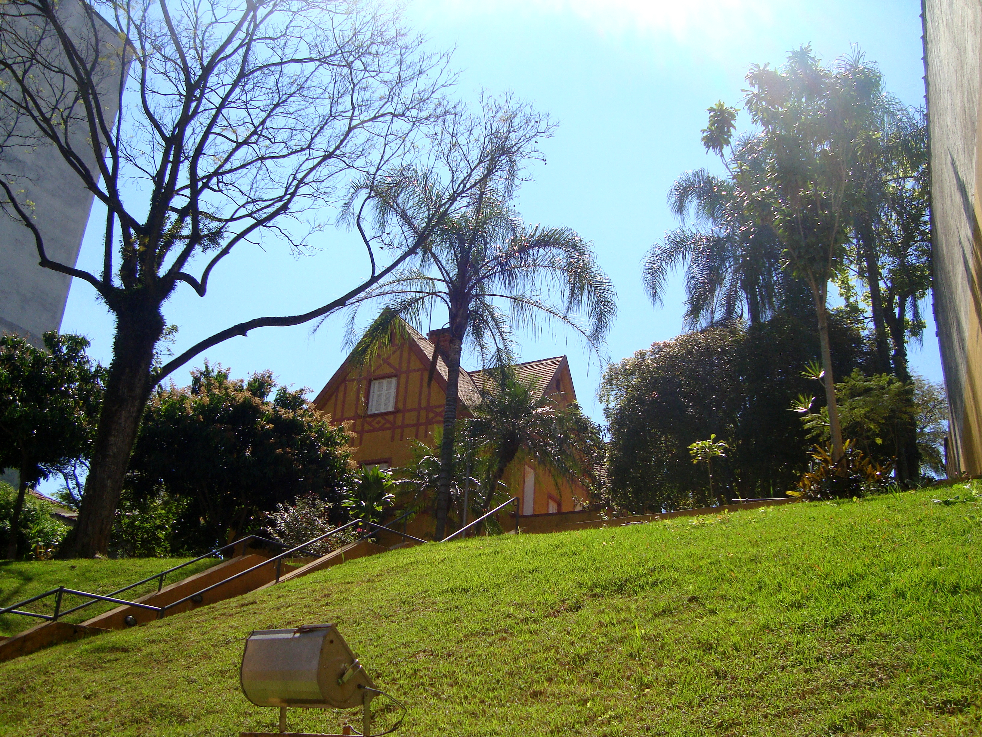 Foto da Biblioteca Narbal Fontes em Santana, bairro da cidade de São Paulo.